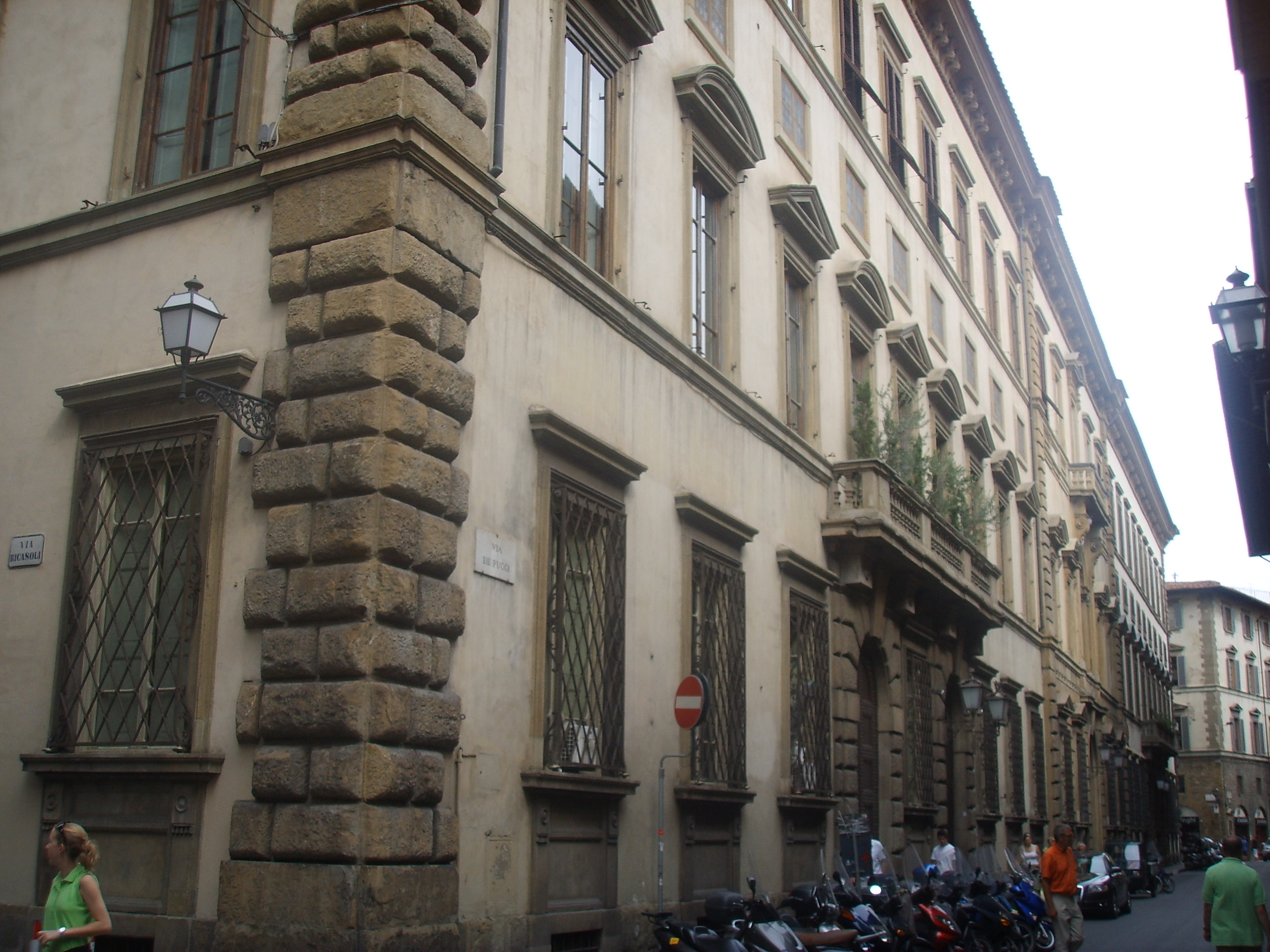 Palazzo Pucci in Florence Italy